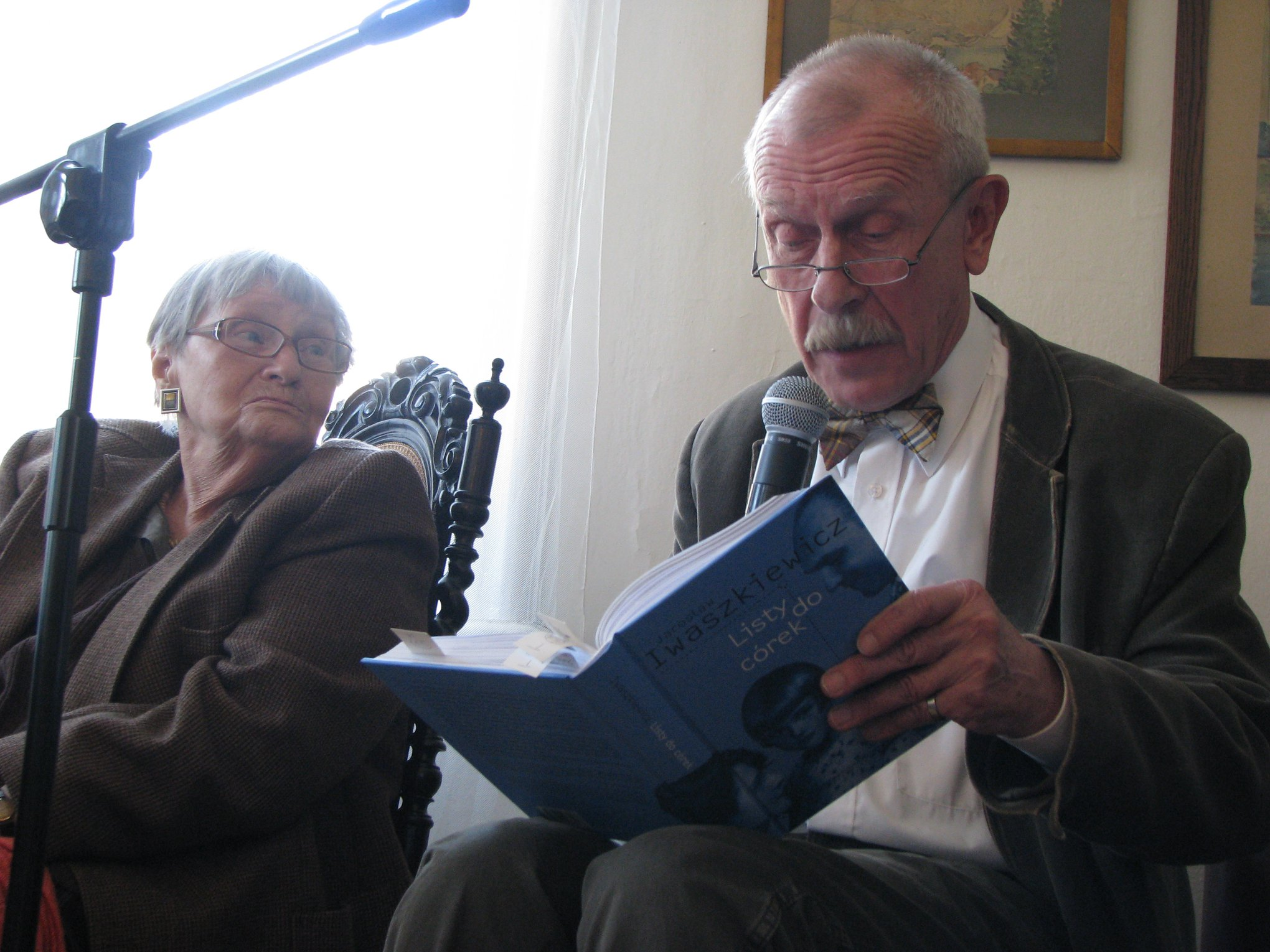 Maria Iwaszkiewicz-Wojdowska (1924-2019) and Józef Duriasz (b. 1936)